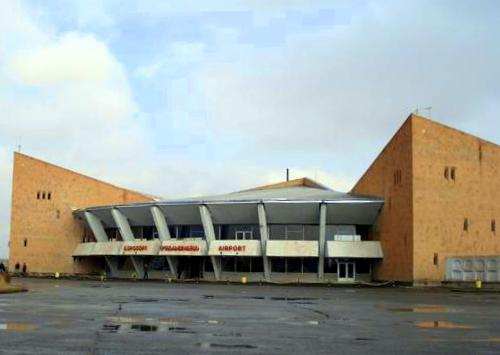 Shirak Airport in Gyumri